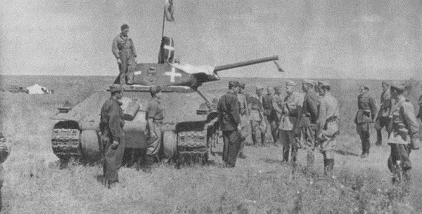 Russia, carro armato sovietico ispezionato dal generale Gariboldi, comandante dell’ARMIR, 8^ Armata Italiana